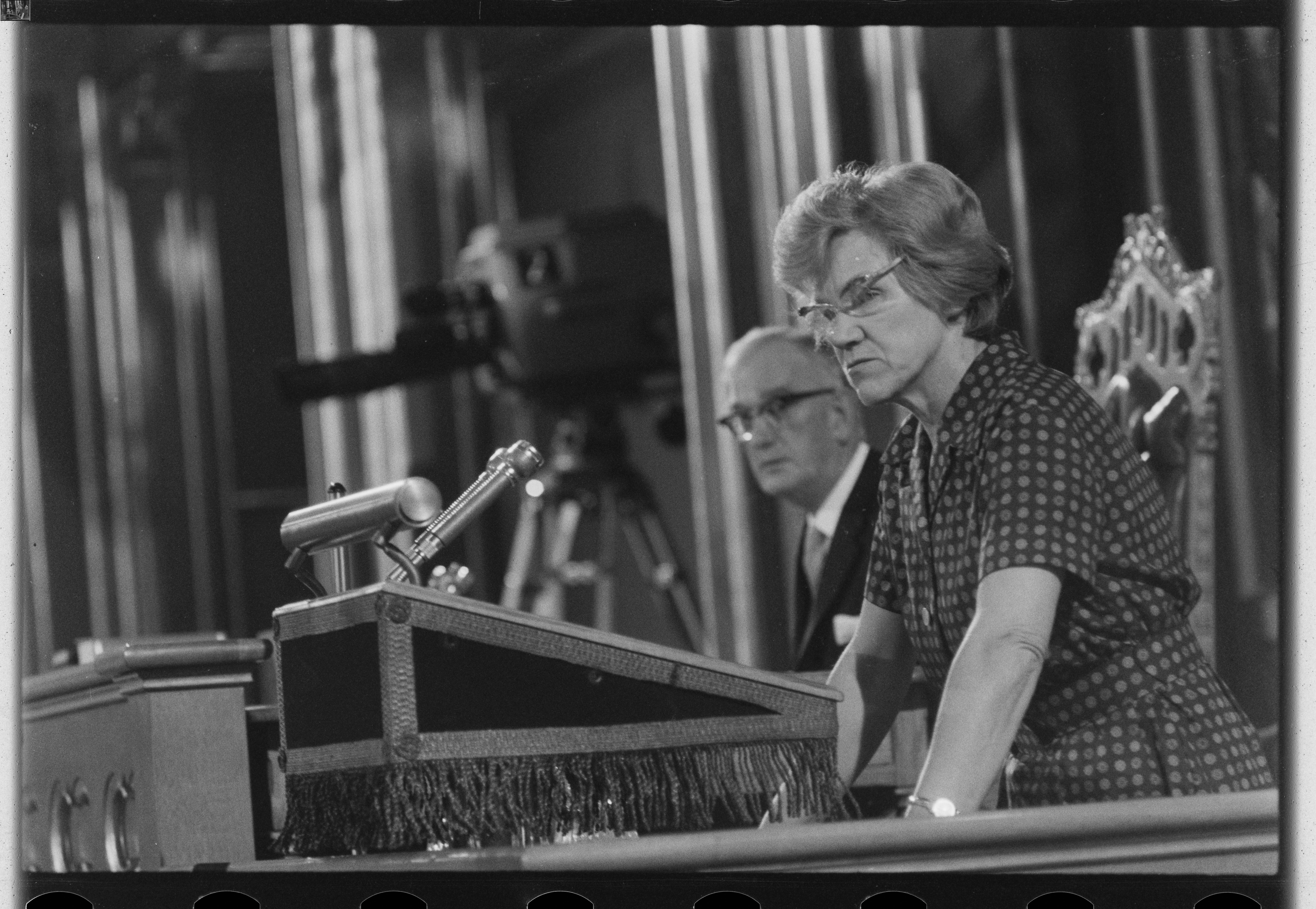 Bildet er hentet fra Arkivverket. Regjeringen Lyngs siste dag, fra debatten i Stortinget Arkivinstitusjon : Riksarkivet Arkivnavn : Billedbladet NÅ Sted : Norge, Oslo, Oslo, Stortinget Emneord: Regjeringer, Lyng Avbildet